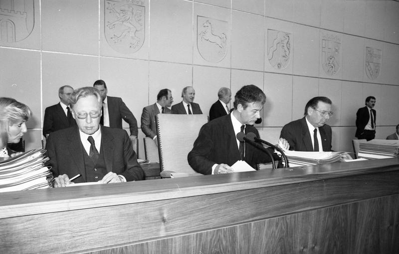 Bonn, 20. Oktober 1989 Letzte Bundesratssitzung unter der Präsidentschaft des Ministerpräsidenten von Schleswig-Holstein, Björn Engholm. Zu seinem Nachfolger als Bundesratspräsident wurde in dieser Sitzung der Regierende Bürgermeister von Berlin, Walter Momper, gewählt.